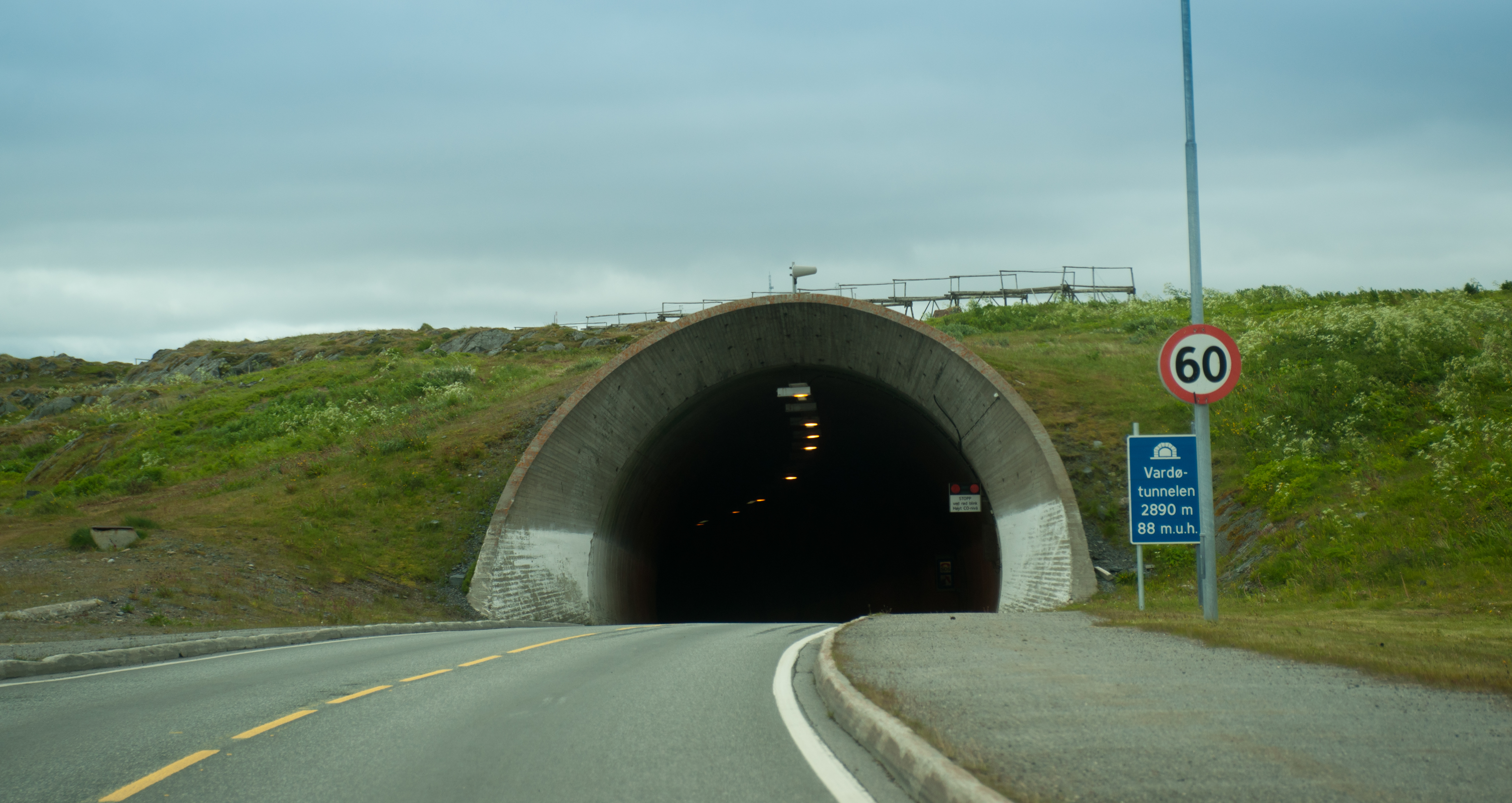 Vardø tunnel, Norway.